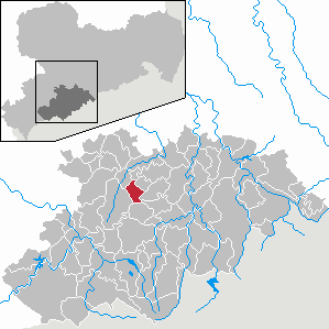 Hormersdorf im Erzgebirgskreis, Sachsen